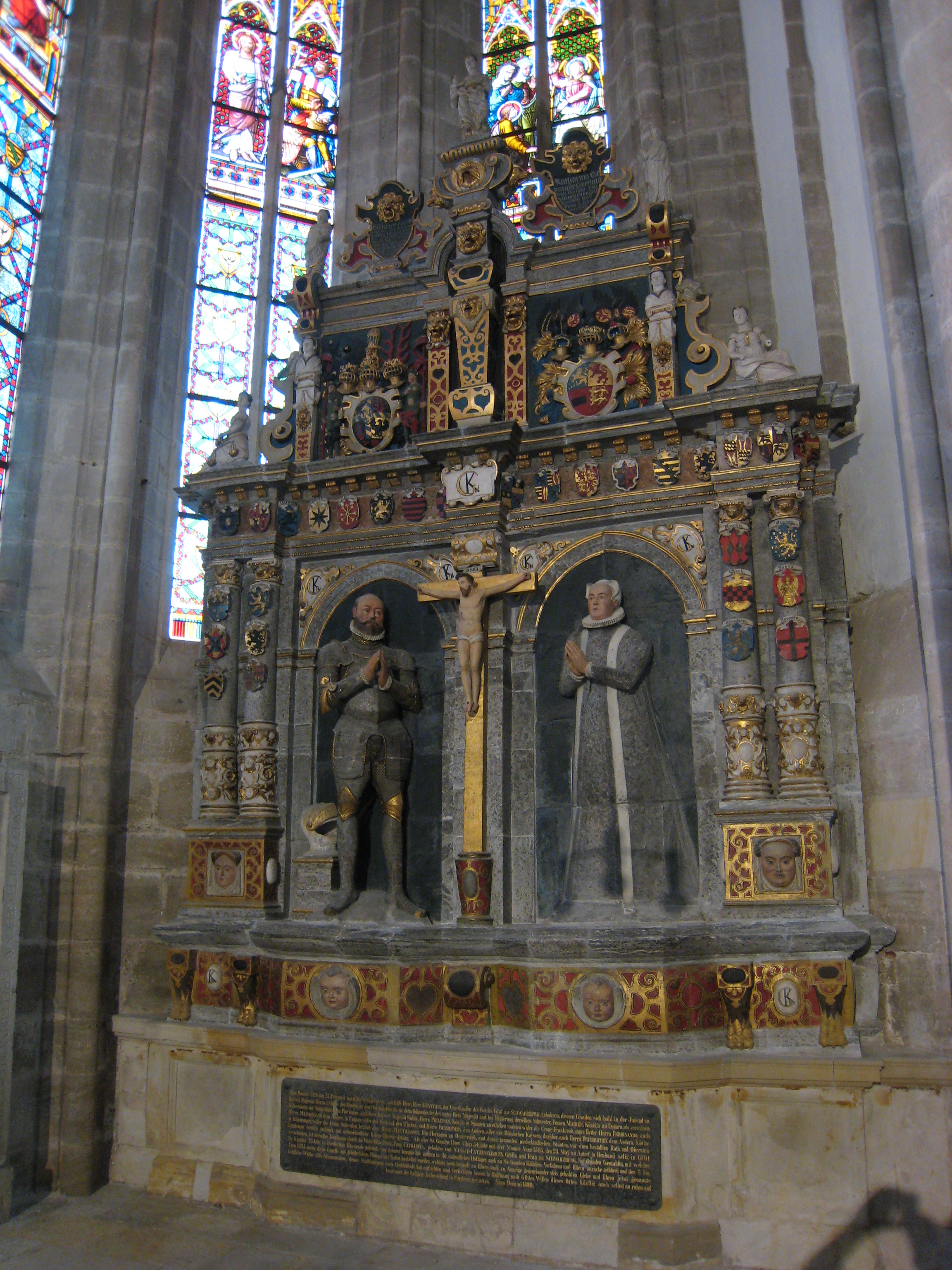 Liebfrauenkirche Arnstadt: Epitaph von 1590 für Günther XLI. („Günther der Streitbare“) von Schwarzburg-Arnstadt (1529–1583) und seine Frau Katharina von Nassau-Dillenburg (1543–1624)